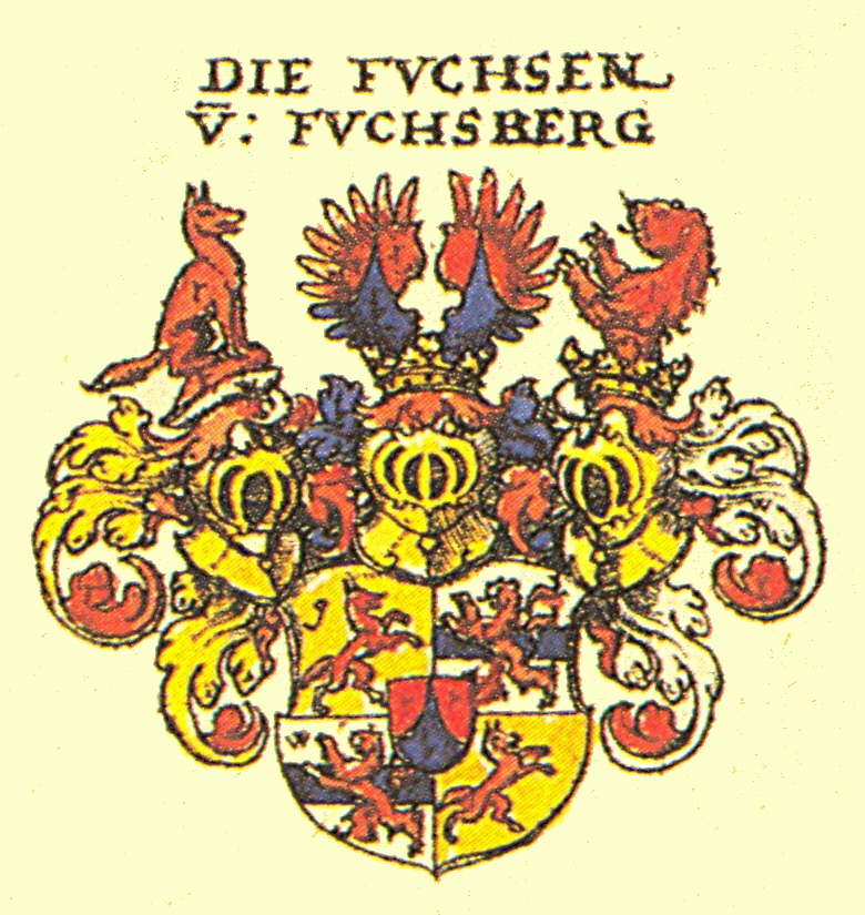 Wappen der Fränkischen Adelsfamilie der Freiherren Fuchs von Fuchsberg